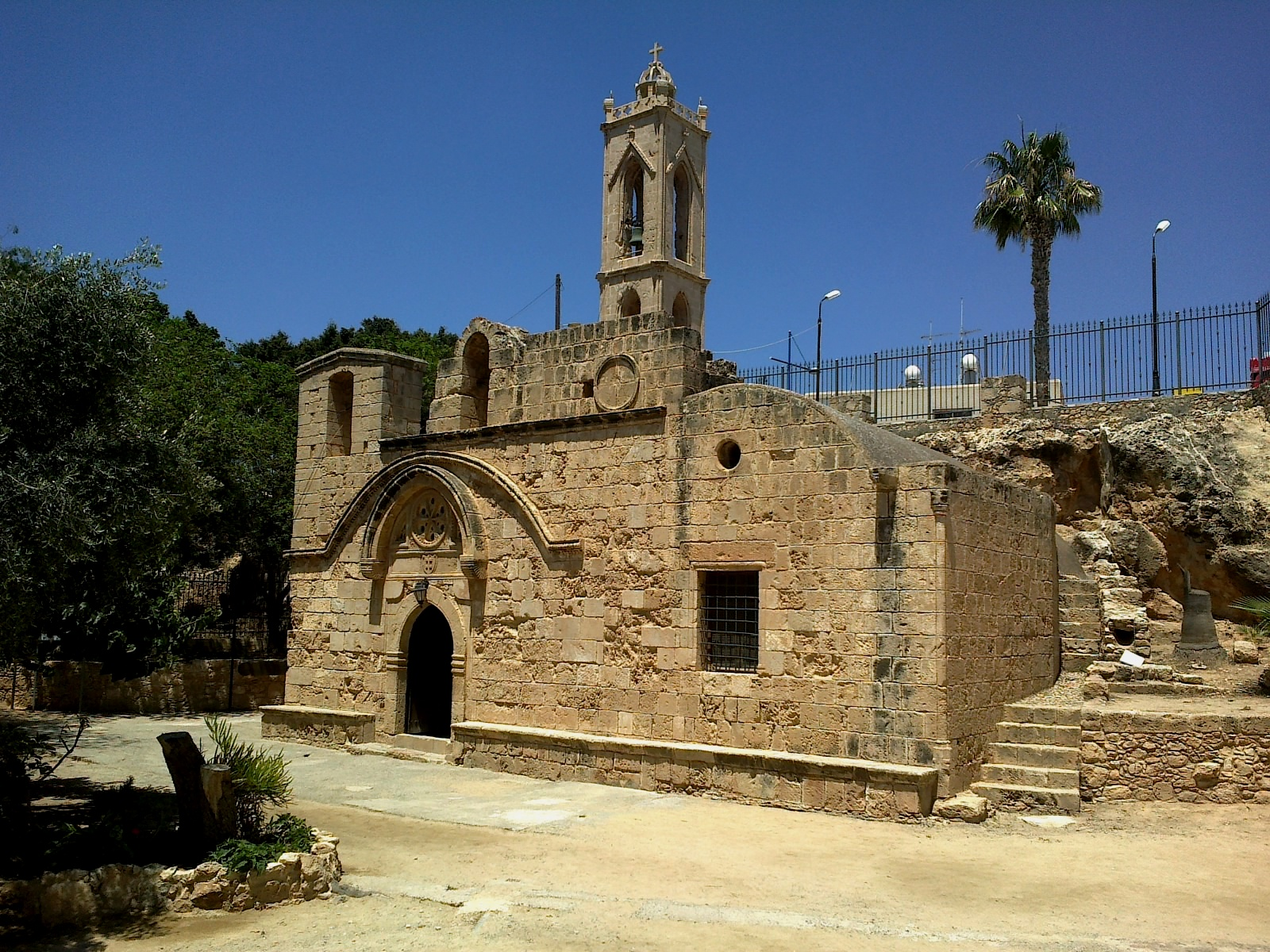 Chypre Agia Napa Monastere Venitien Eglise